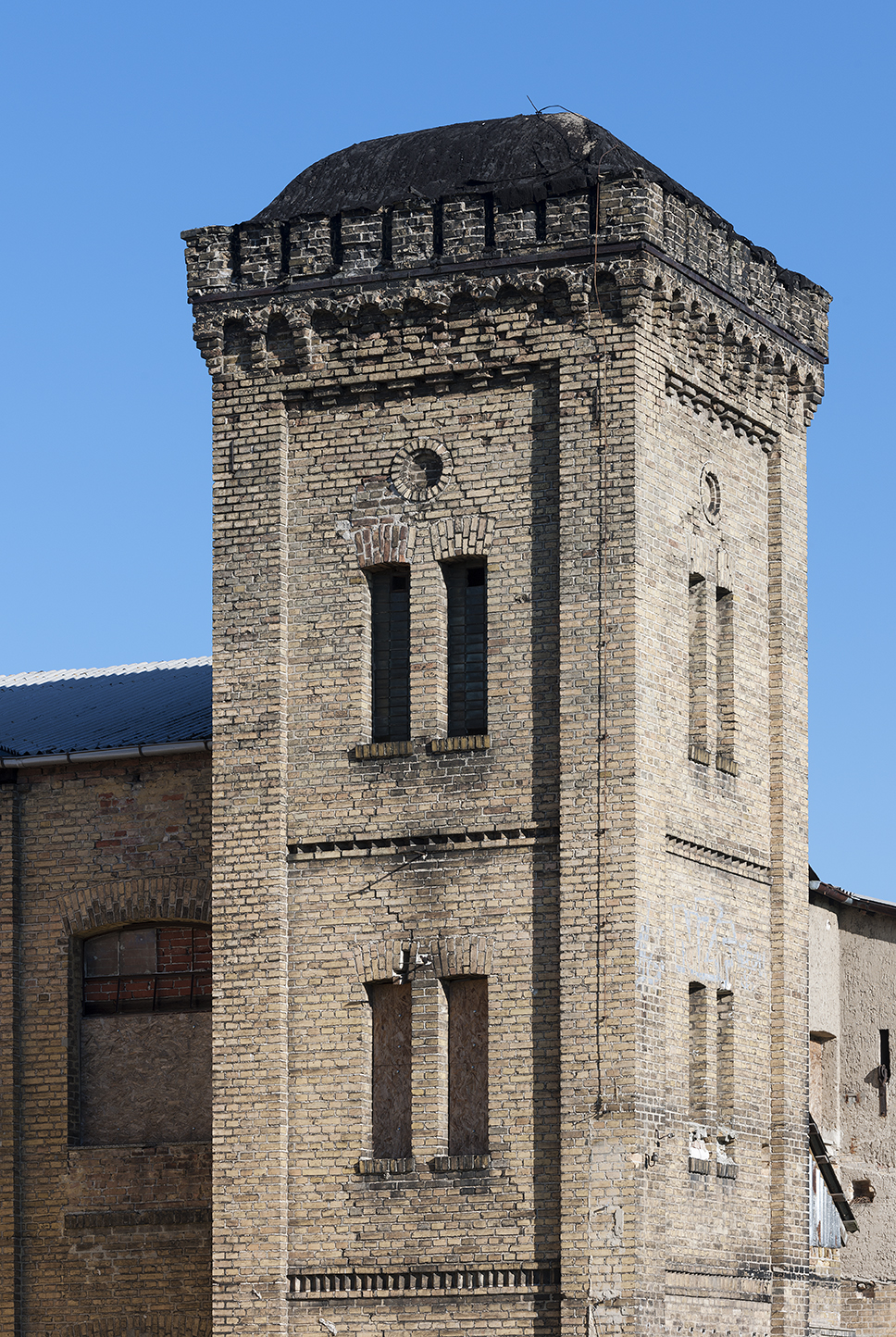 Potsdam, Lotte-Pulewka-Straße 41/43, ehem. Jute-Spinnerei (künftig Wohnanlage "Jute-Lofts").